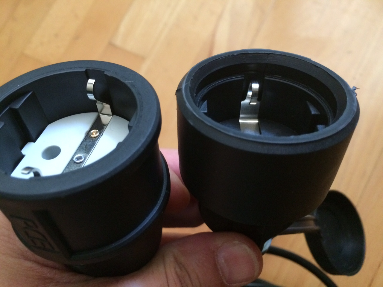 Schukokupplung in normaler Ausführung (DIN 49441) und in spritzwassergschützter Ausführung (DIN 49441-2)